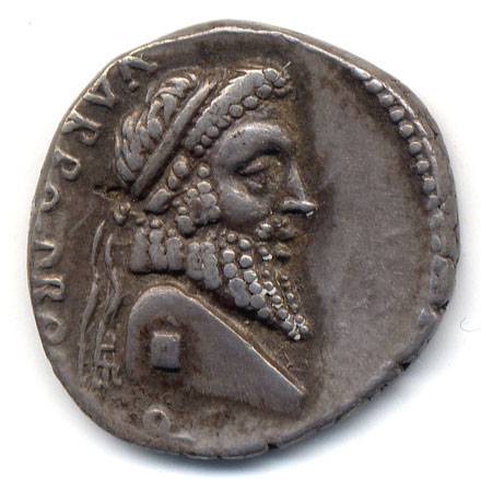 Varroren irudia agertzen duen erromatar txanpon bat.